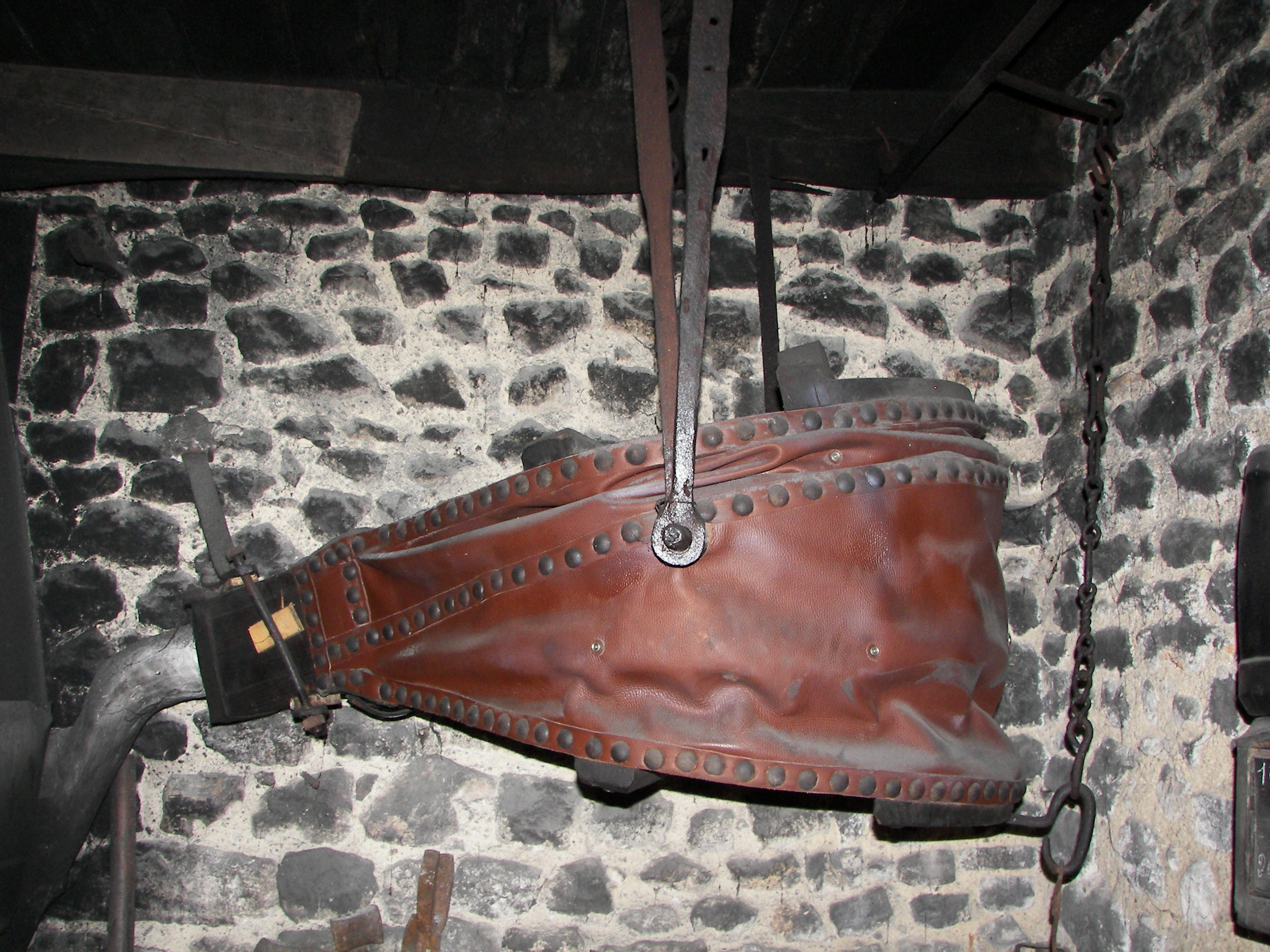 Soufflet de forge en Dordogne